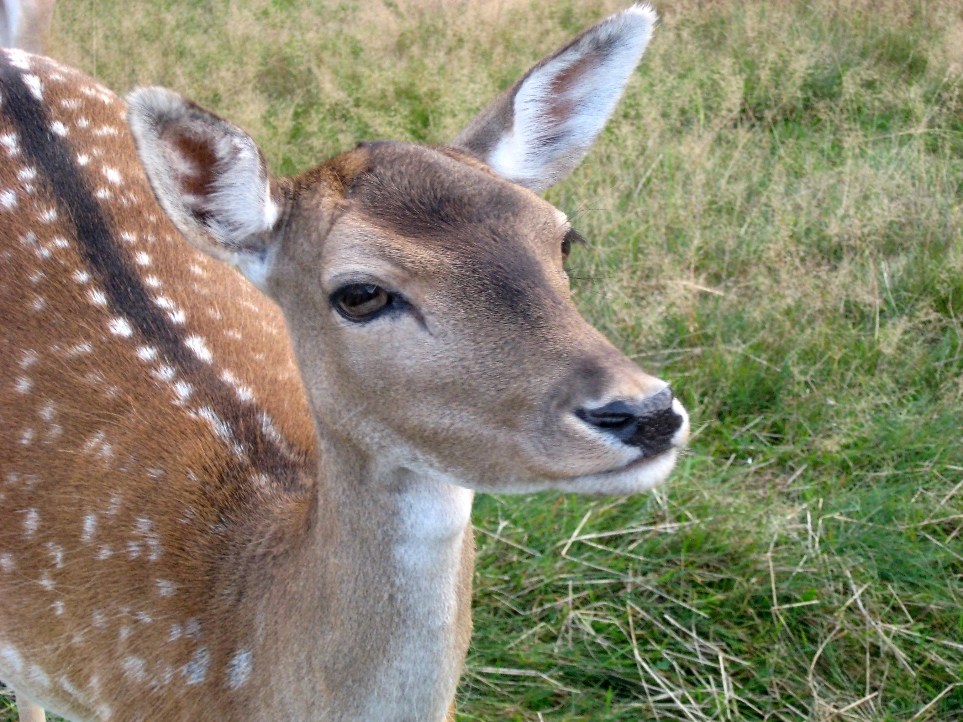 daniel